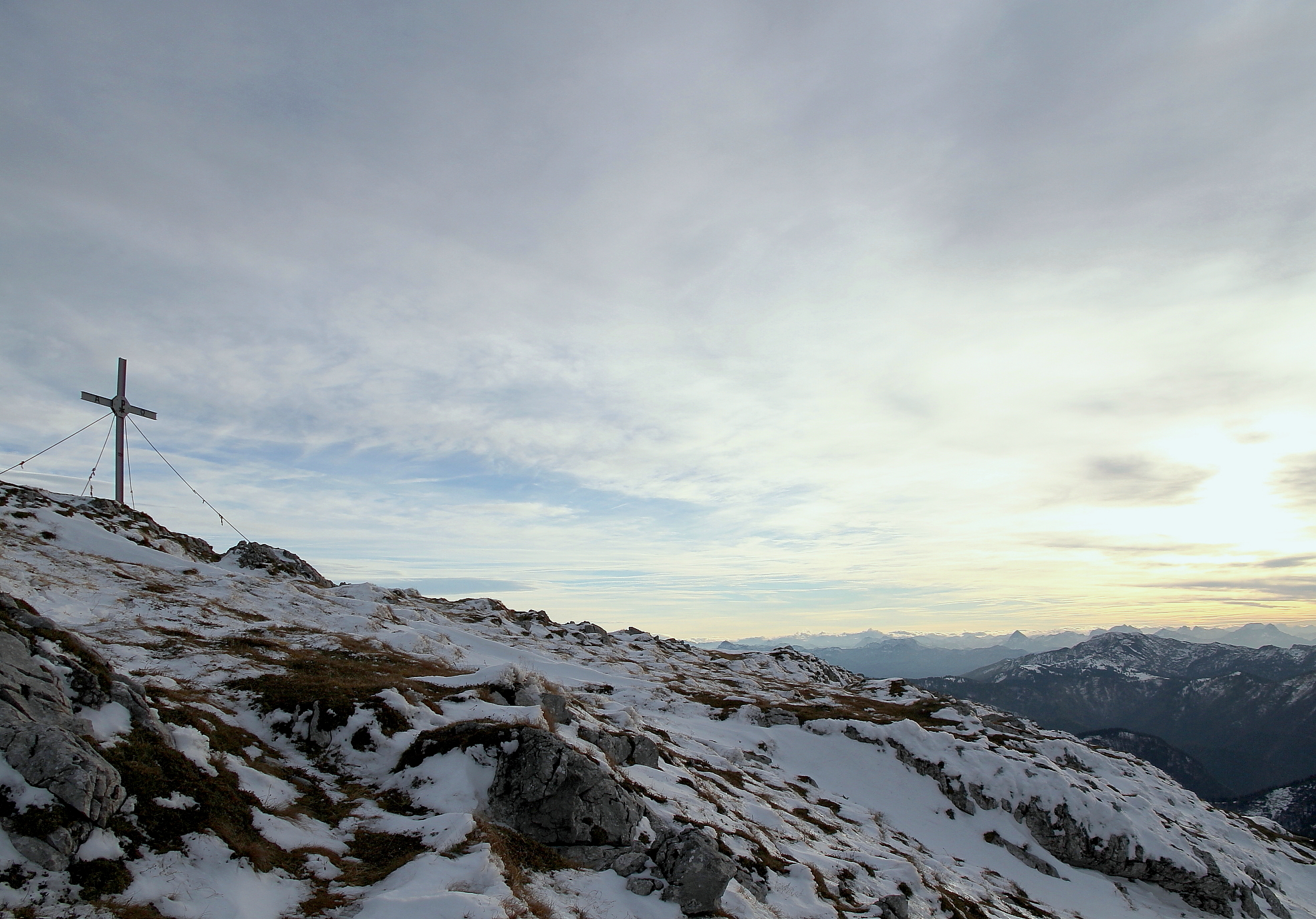 Gipfel des Ötschers mit Gipfelkreuz.